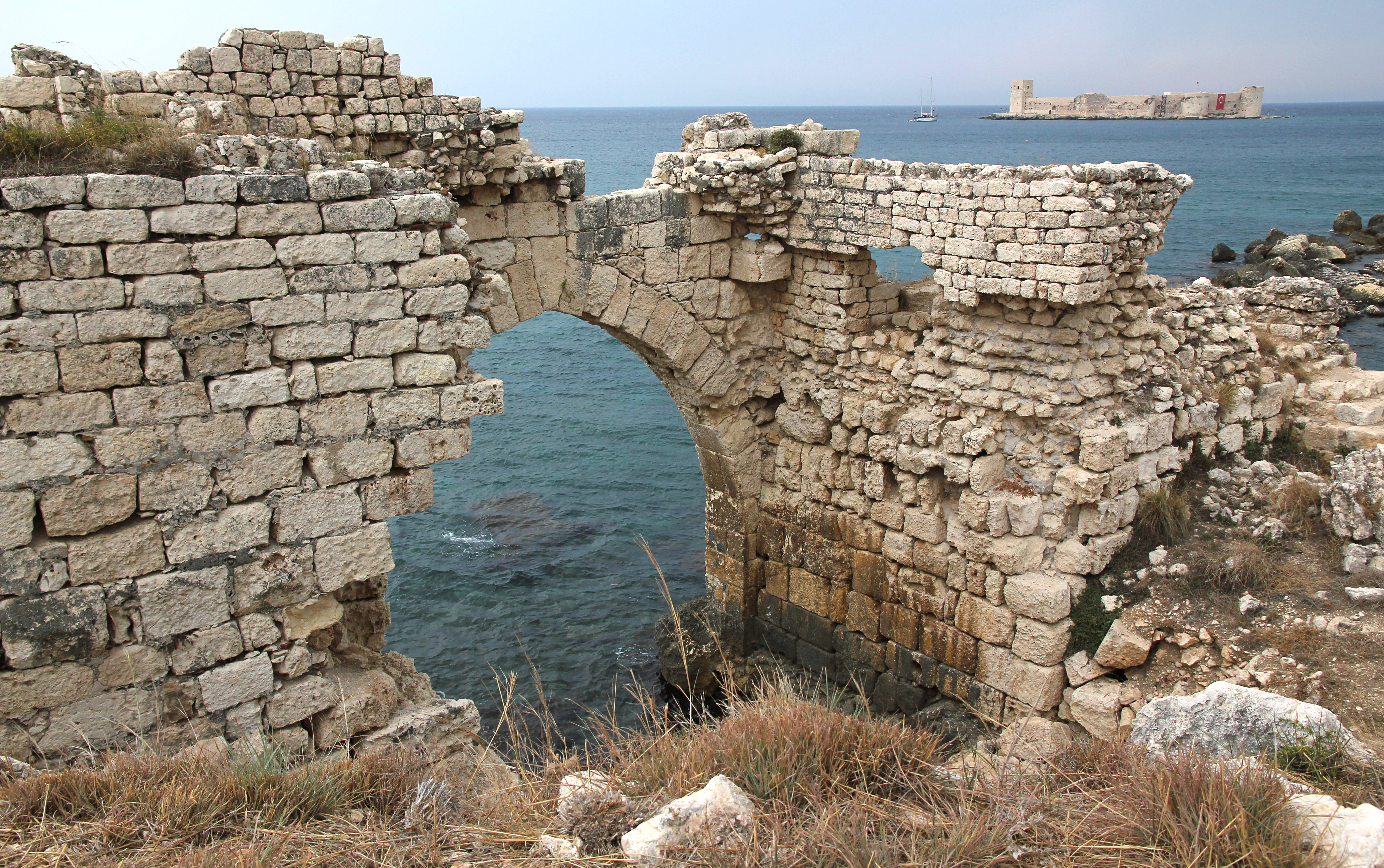 Korykos, Landburg bei Kızkalesi, Südtürkei, Seetor im Südwestturm, rechts die Seeburg (Mädchenburg)